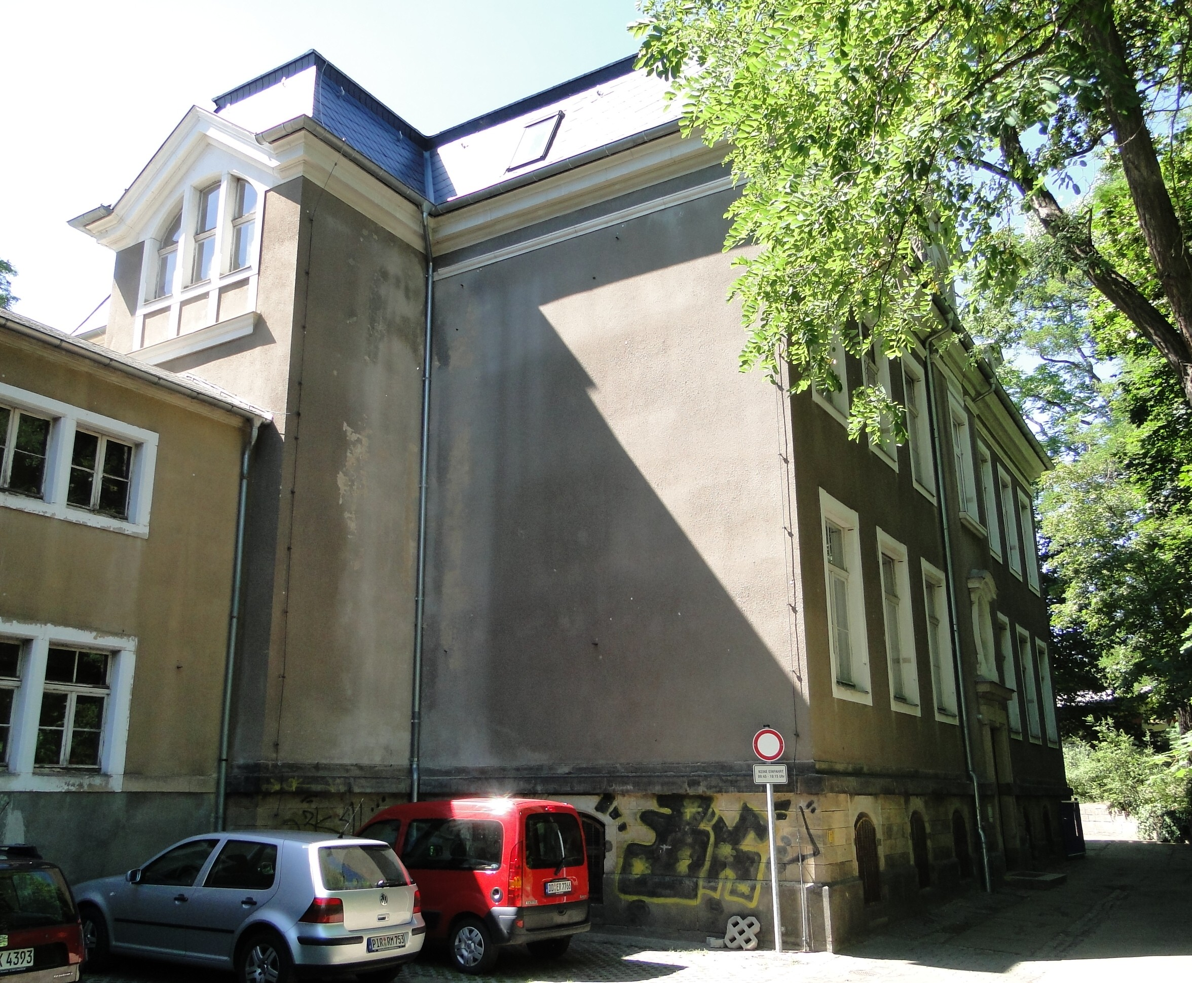 ehemalige Übungsschule des Fletcherschen Lehrerseminars, heute Teil der Waldorfschule Dresden